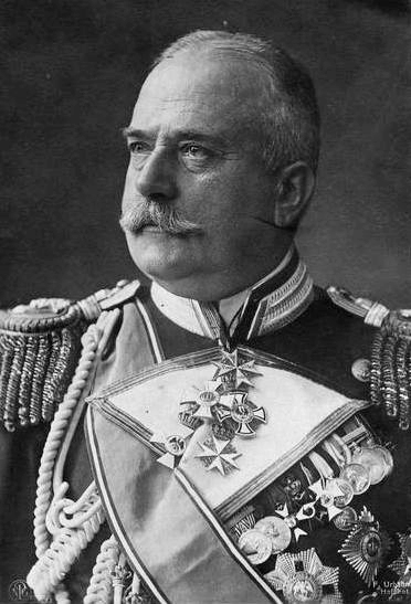 Kapitan zur See Guido von Usedom, später Admiral in osmanischen Diensten